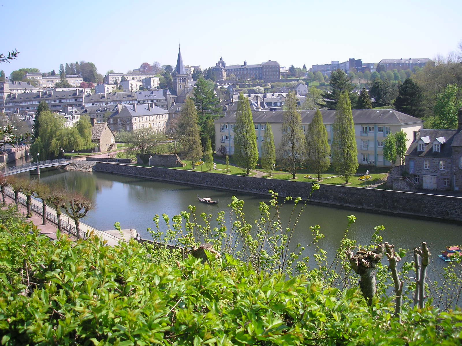 Vire (France, Normandie), vue vers l'écluse et l'église Sainte-Anne du haut de la place du château.